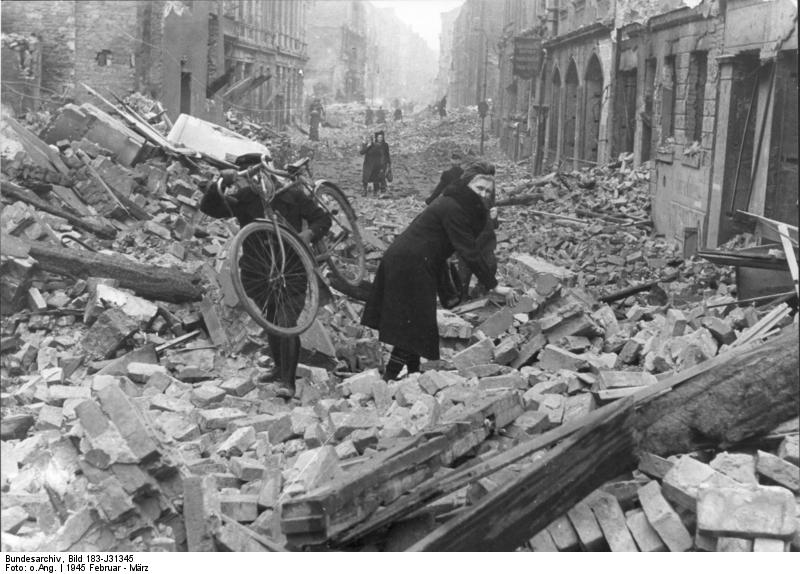 Berlin, Zerstörung nach Luftangriff ADN-ZB/Archiv II. Weltkrieg 1939-45 Nach einem der alliierten Luftangriffe 1945 auf Berlin suchen die Einwohner mühsam einen Weg durch die Zerstörungen; hier in der Stallschreiberstraße. (Aufnahme entstand vor dem 23.3.1945)